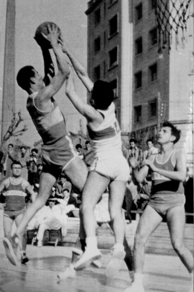 Sebastián Aragonés Miró primero por la dcha.